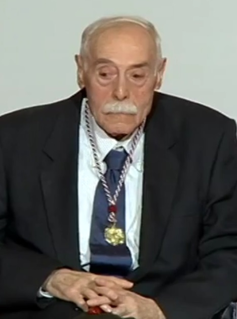 Jesús Hilario Tundidor en la entrega de los Premios Castilla y León 2013, en abril de 2014.